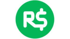 Znak Robux